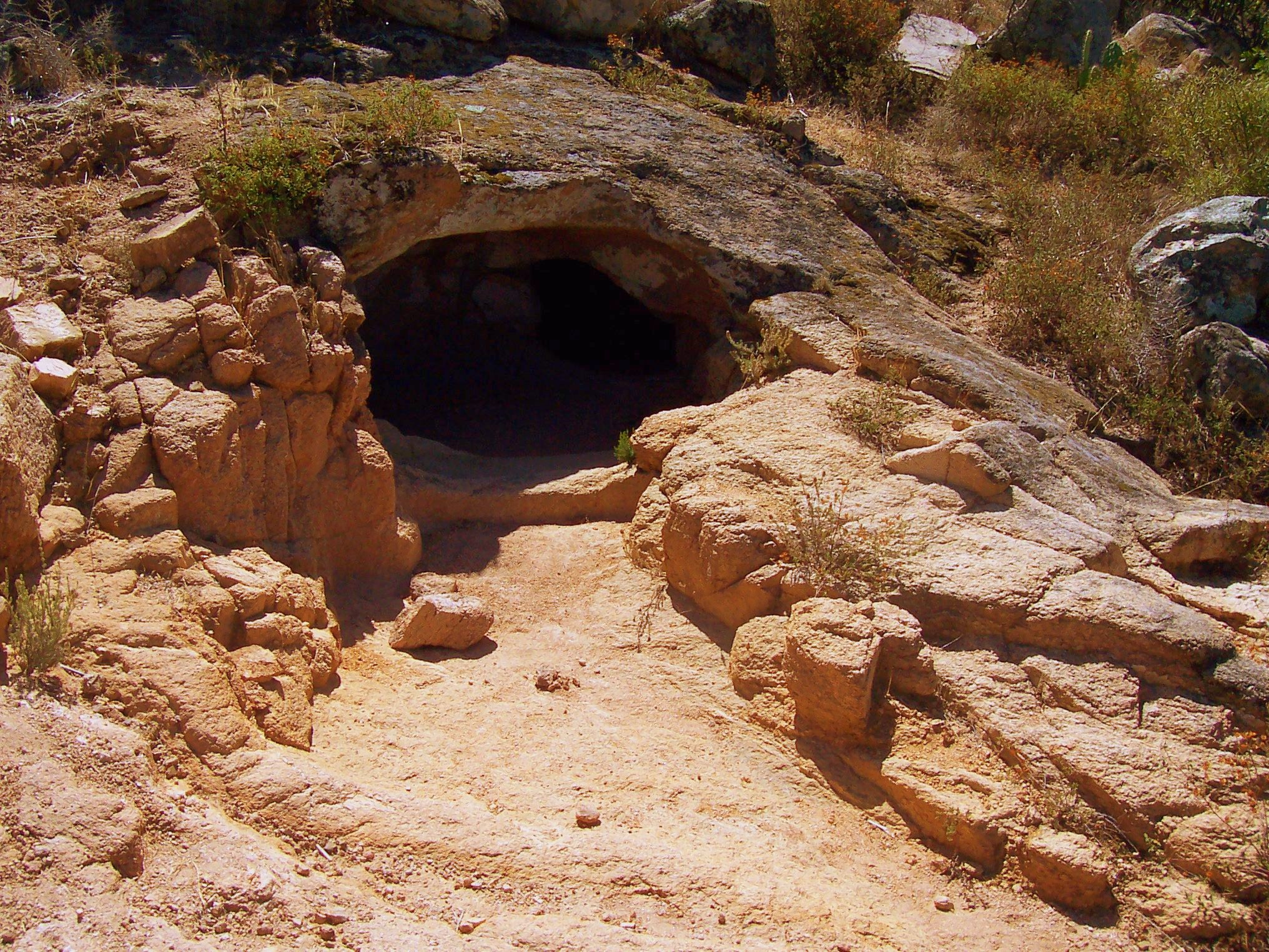 Una domus de Janas nella necropoli nuragica di Lotzorai (OG)